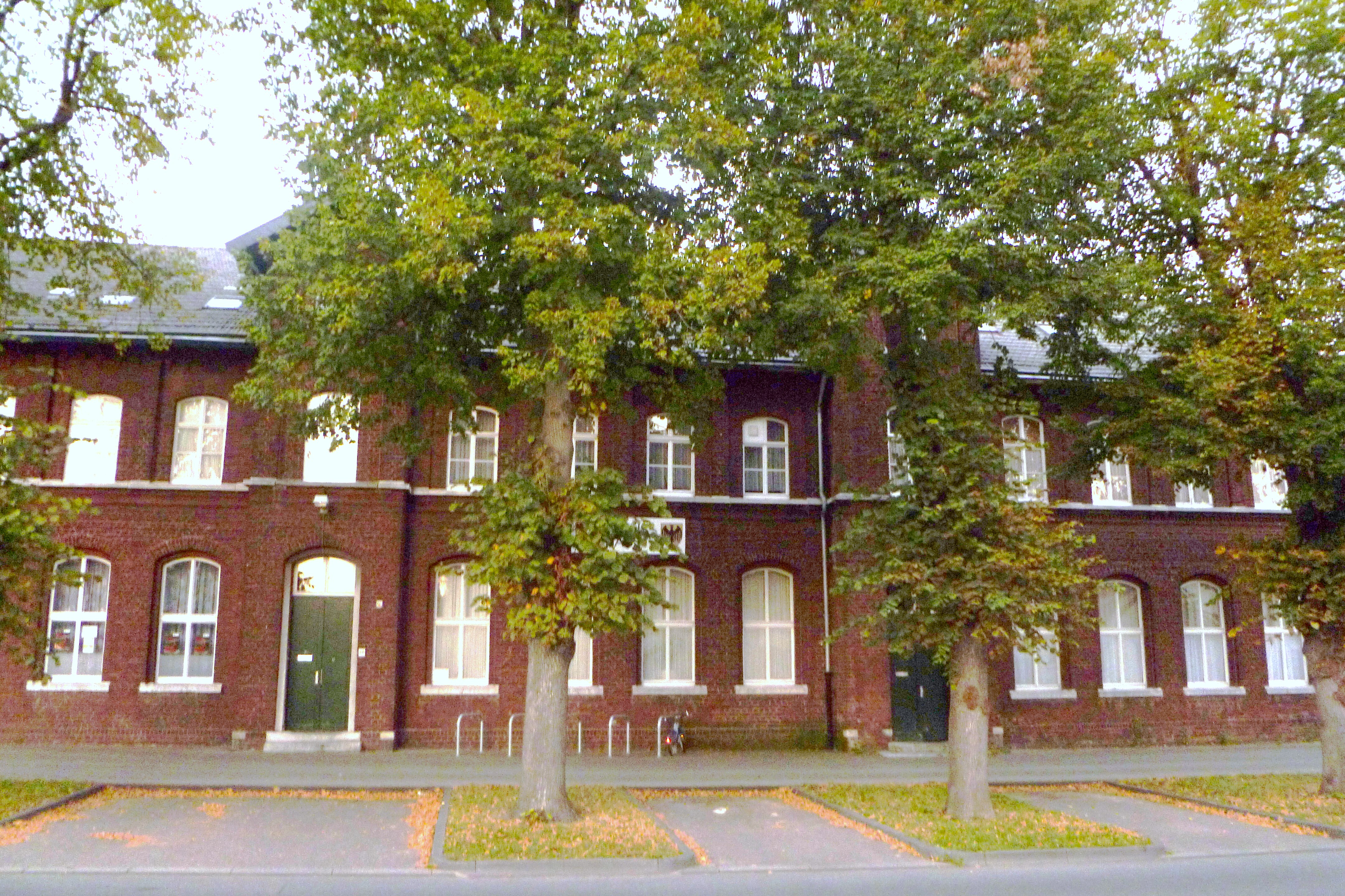 Baudenkmal in Eilendorf